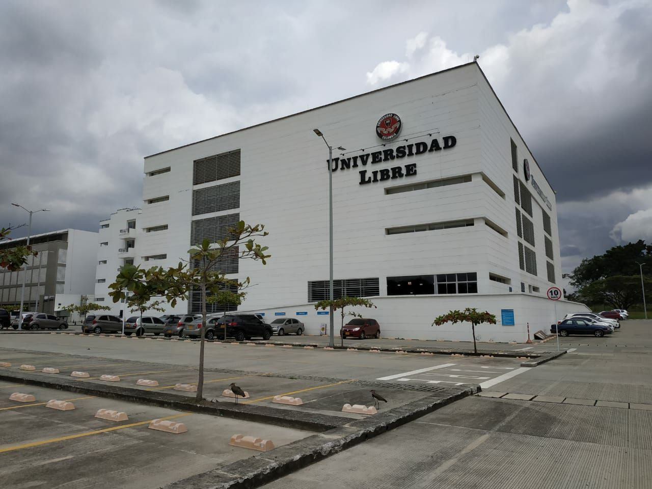 Universidad Libre seccional Cali Esta fotografía fue tomada en el municipio colombiano con código 76001.